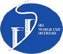 Logo des Arlberg-Kandahar-Rennens in Sestriere